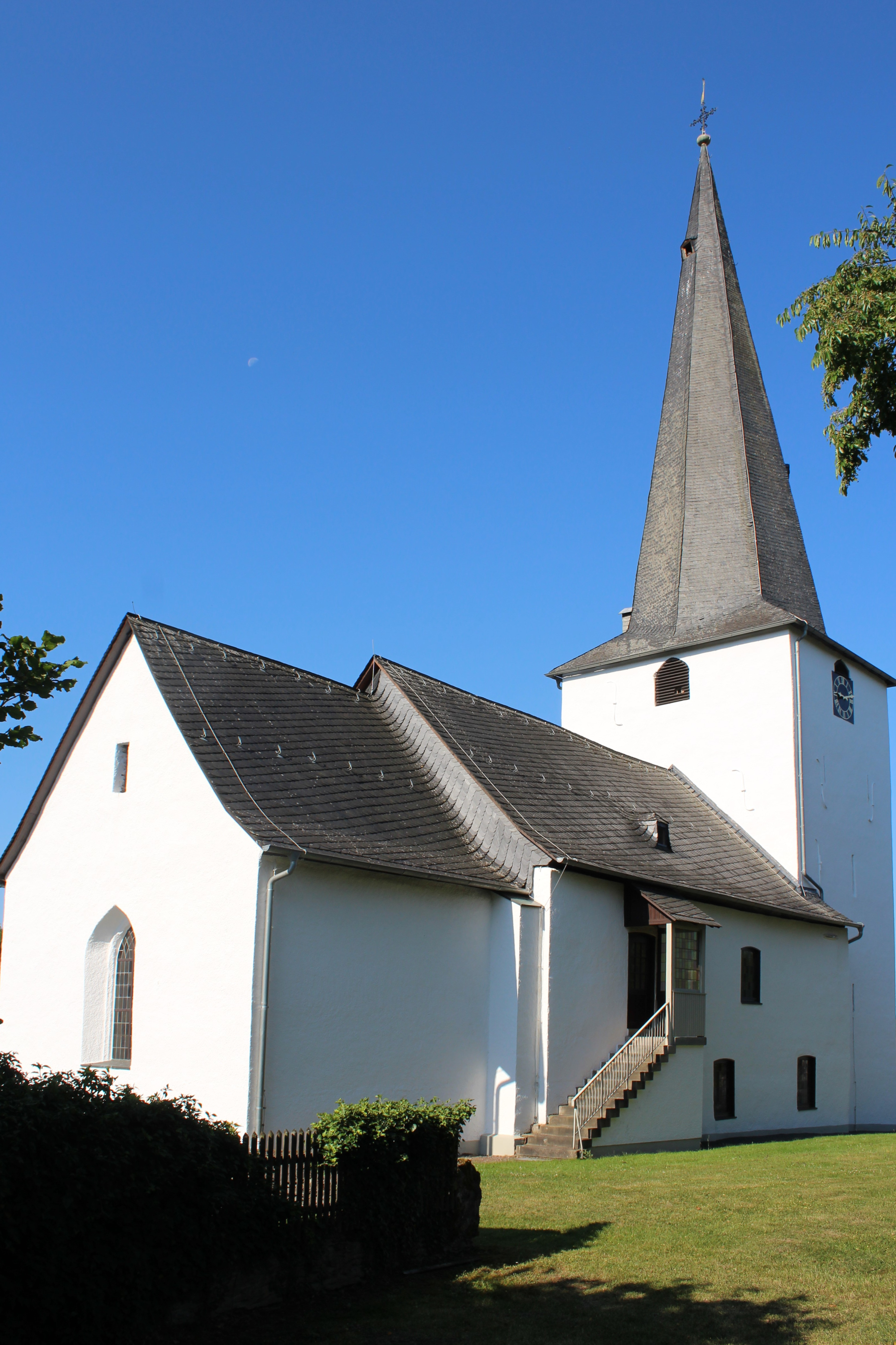 Evangelische Kirche Leun, Lahn-Dill-Kreis, Hessen, Deutschland